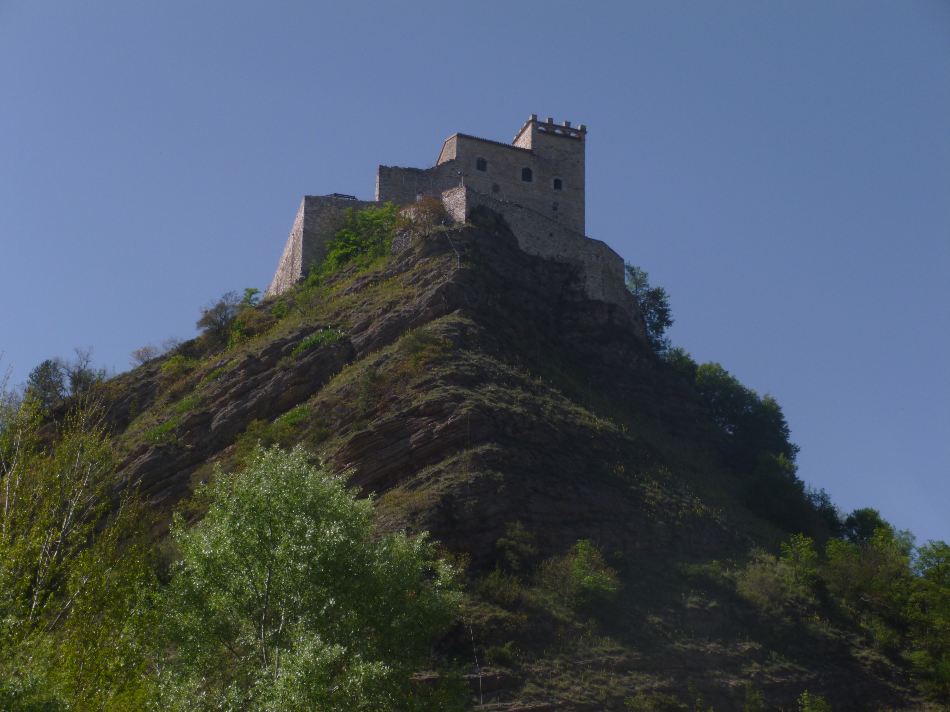 Rocca Varano This is a photo of a monument which is part of cultural heritage of Italy.